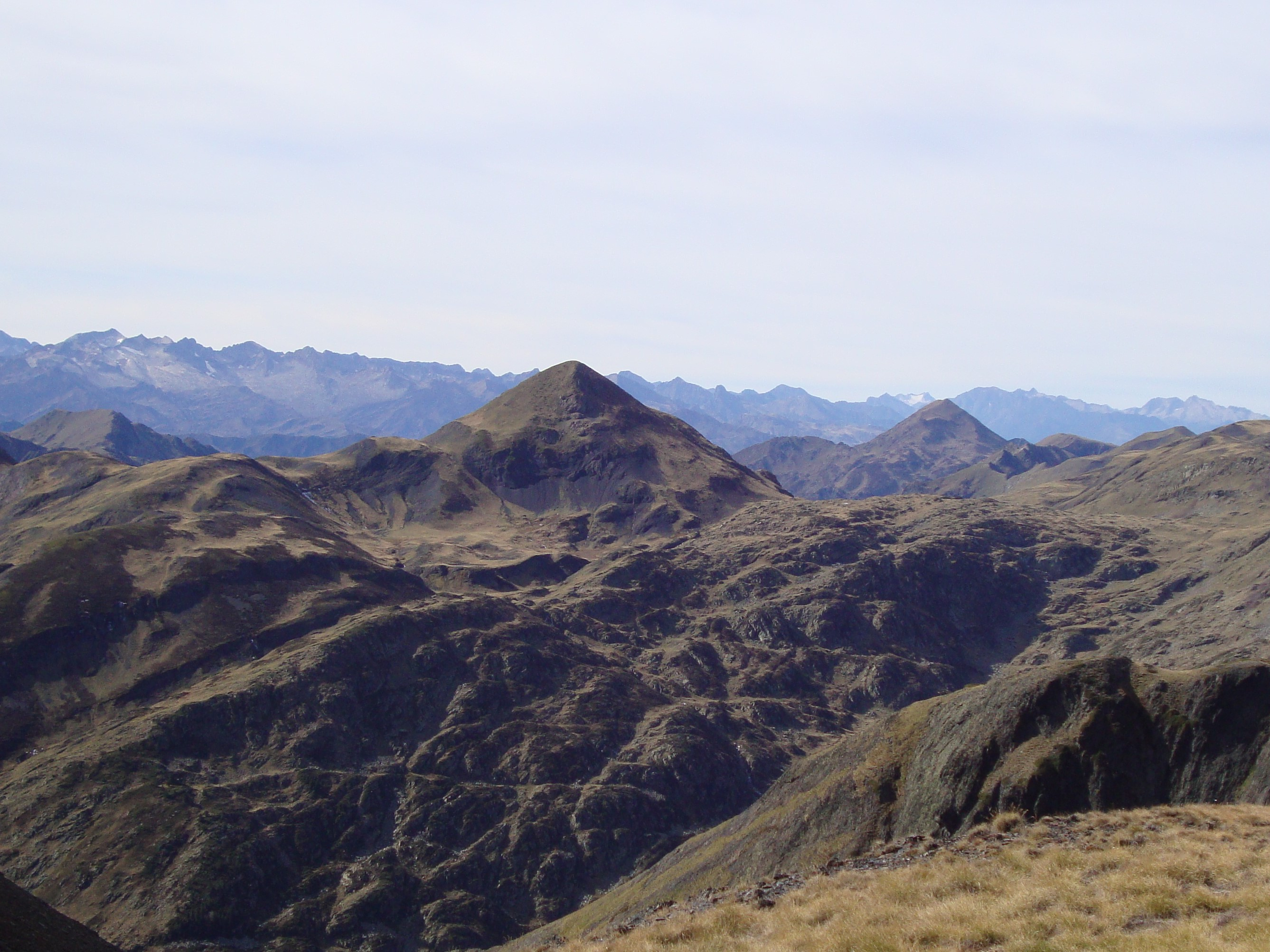 Tuc des Armèros